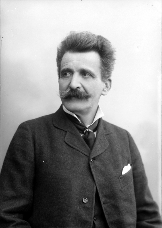 Arturo Garzes